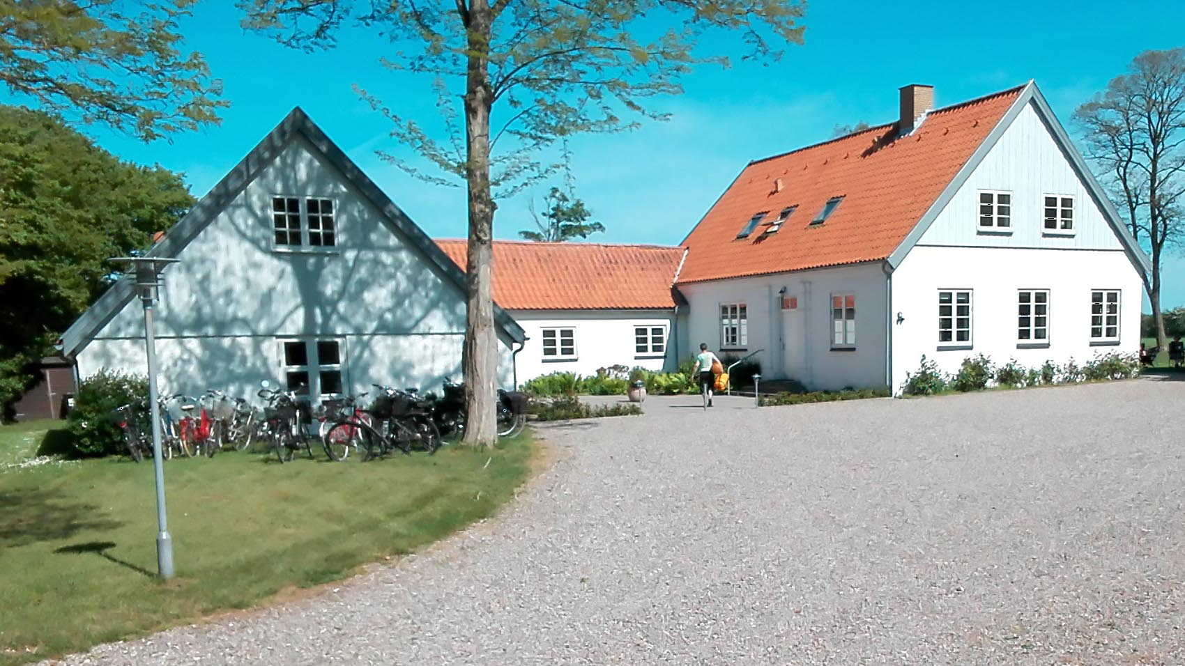 Sundeved-Centeret i Stenderup